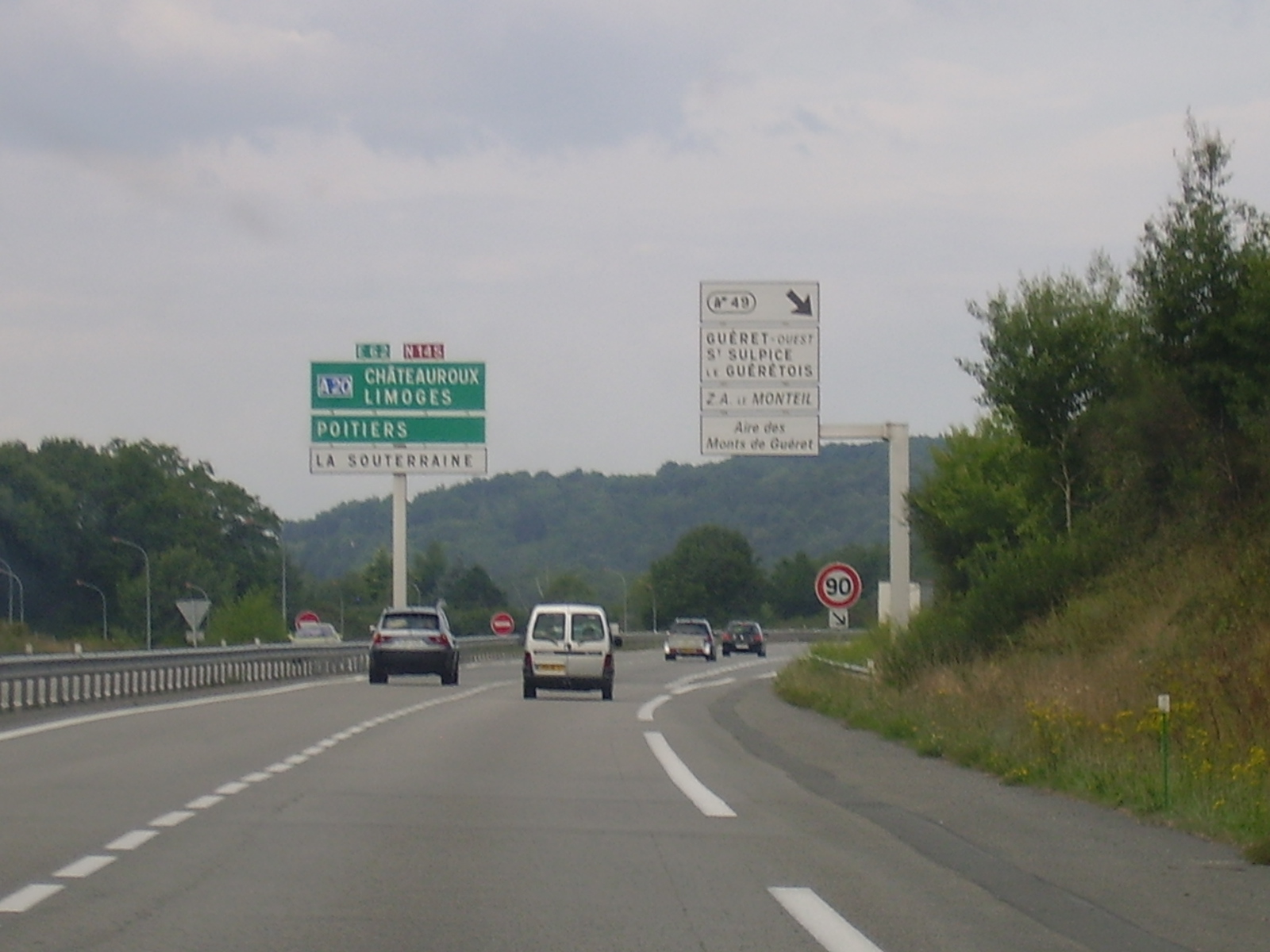 RN 145 au niveau de la sortie 49 (Guéret-Ouest), vers Limoges, Limousin, France